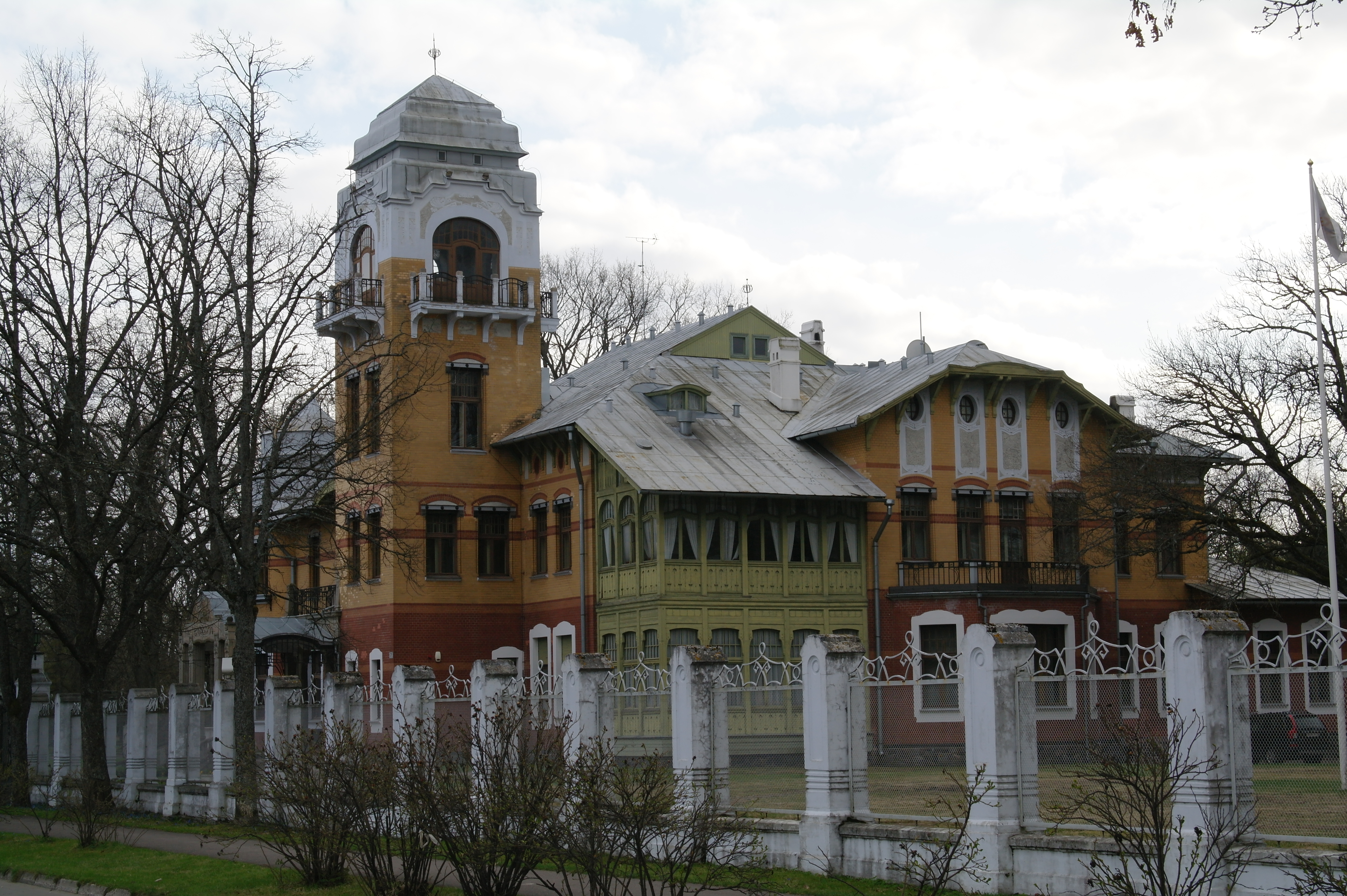 Pärnu Ammende villa